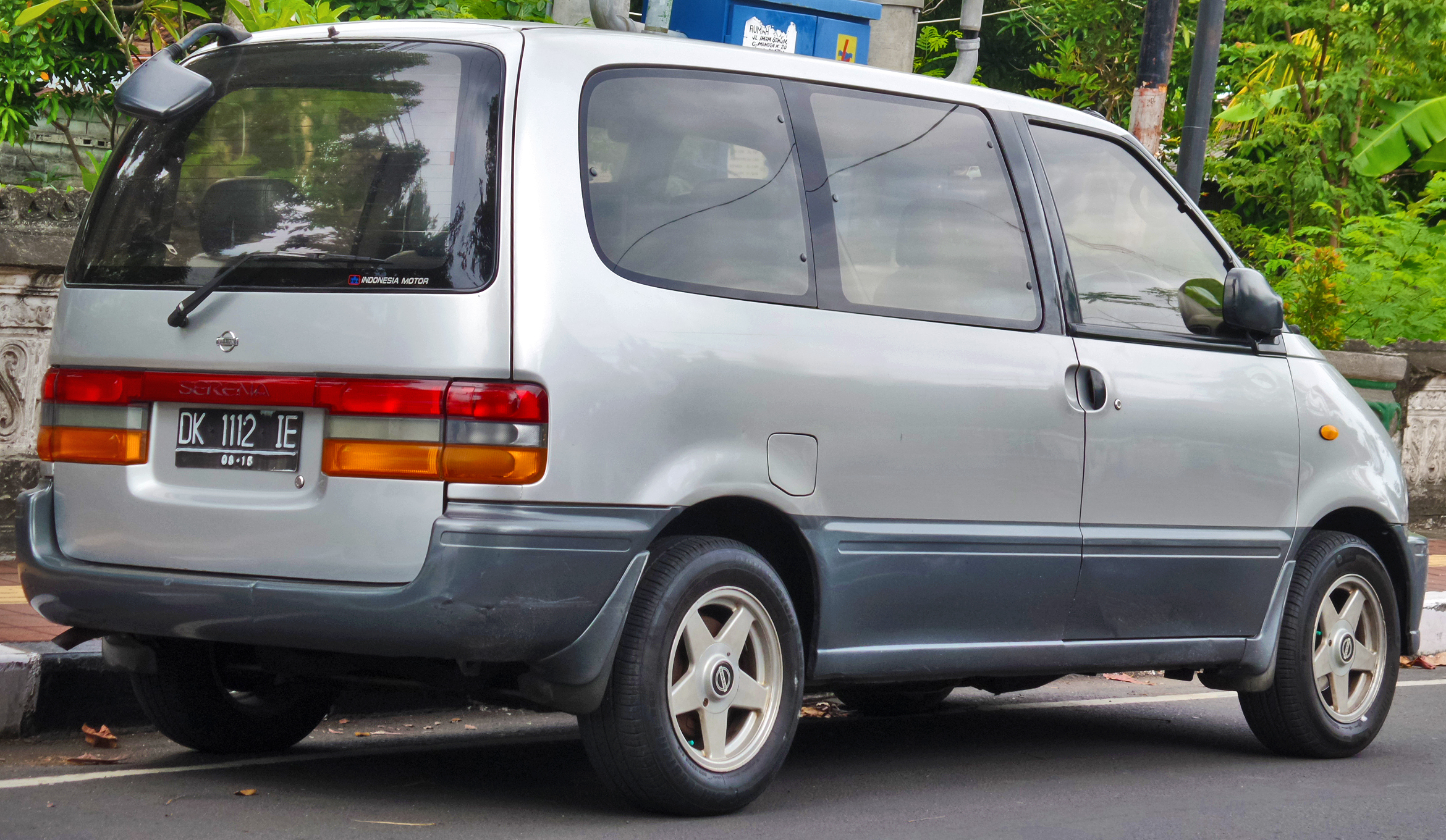 Nissan Serena